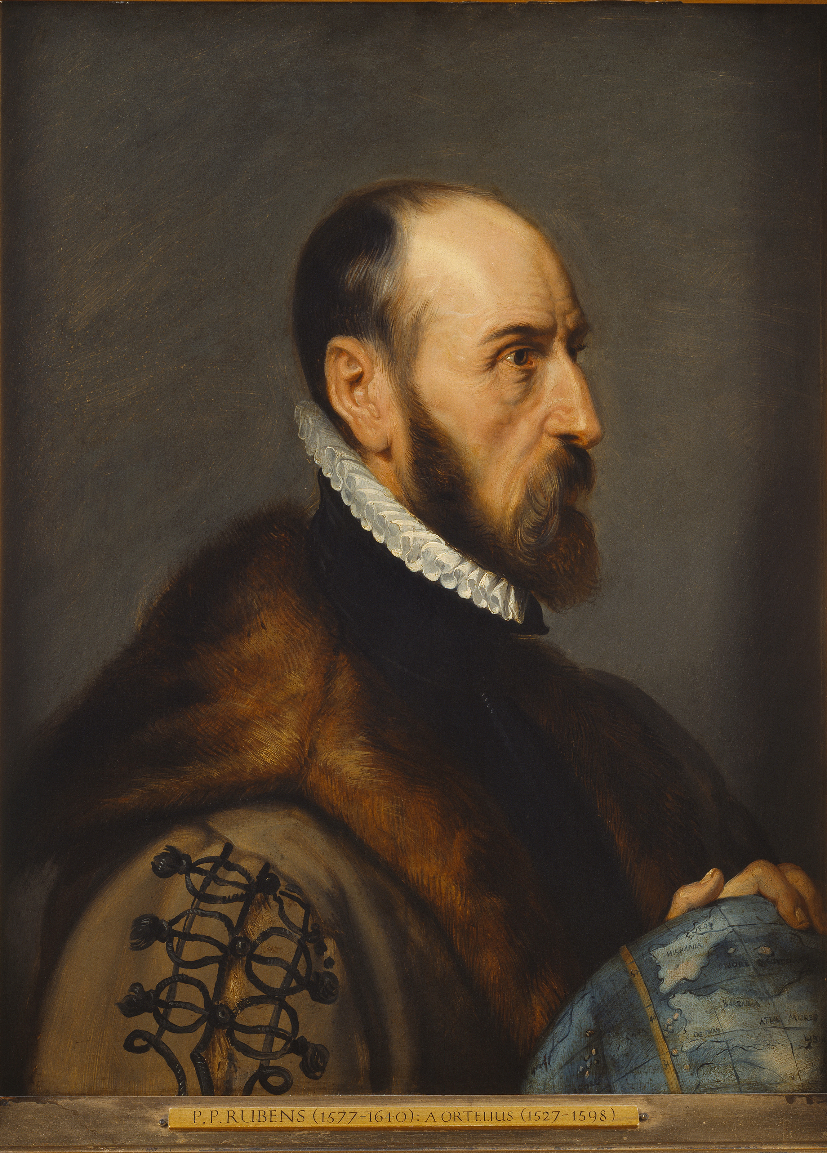 schilderij ( Peter Paul Rubens ( Museum Plantin-Moretus